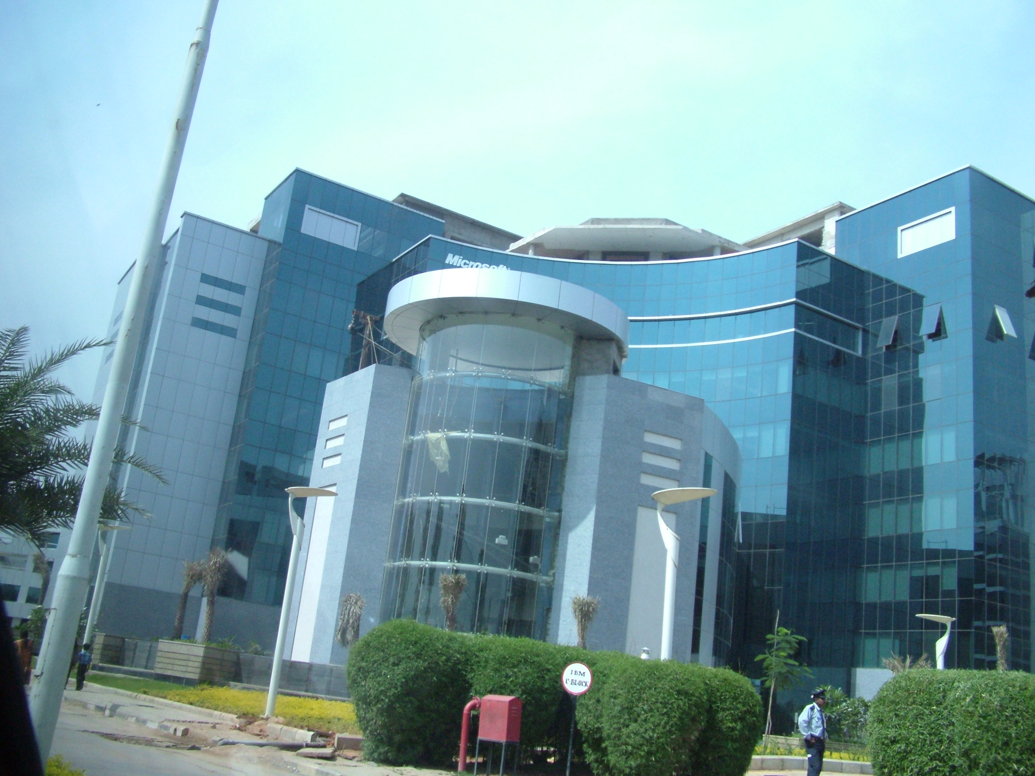 BarCamp Bangalore